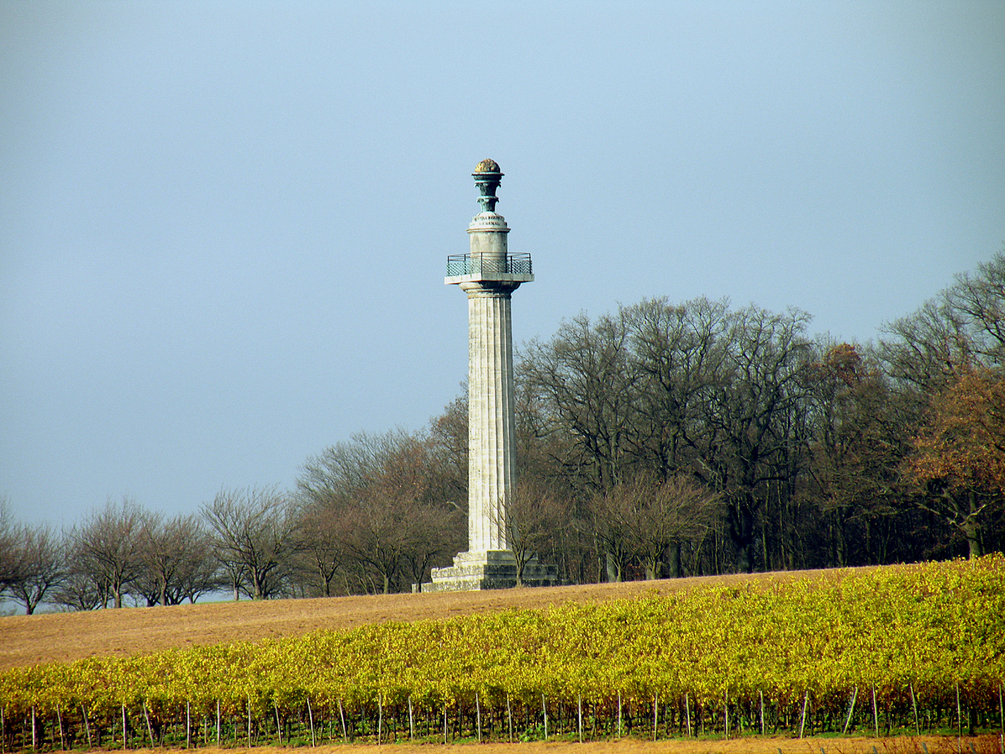 Лео Кленце. Столб Конституции